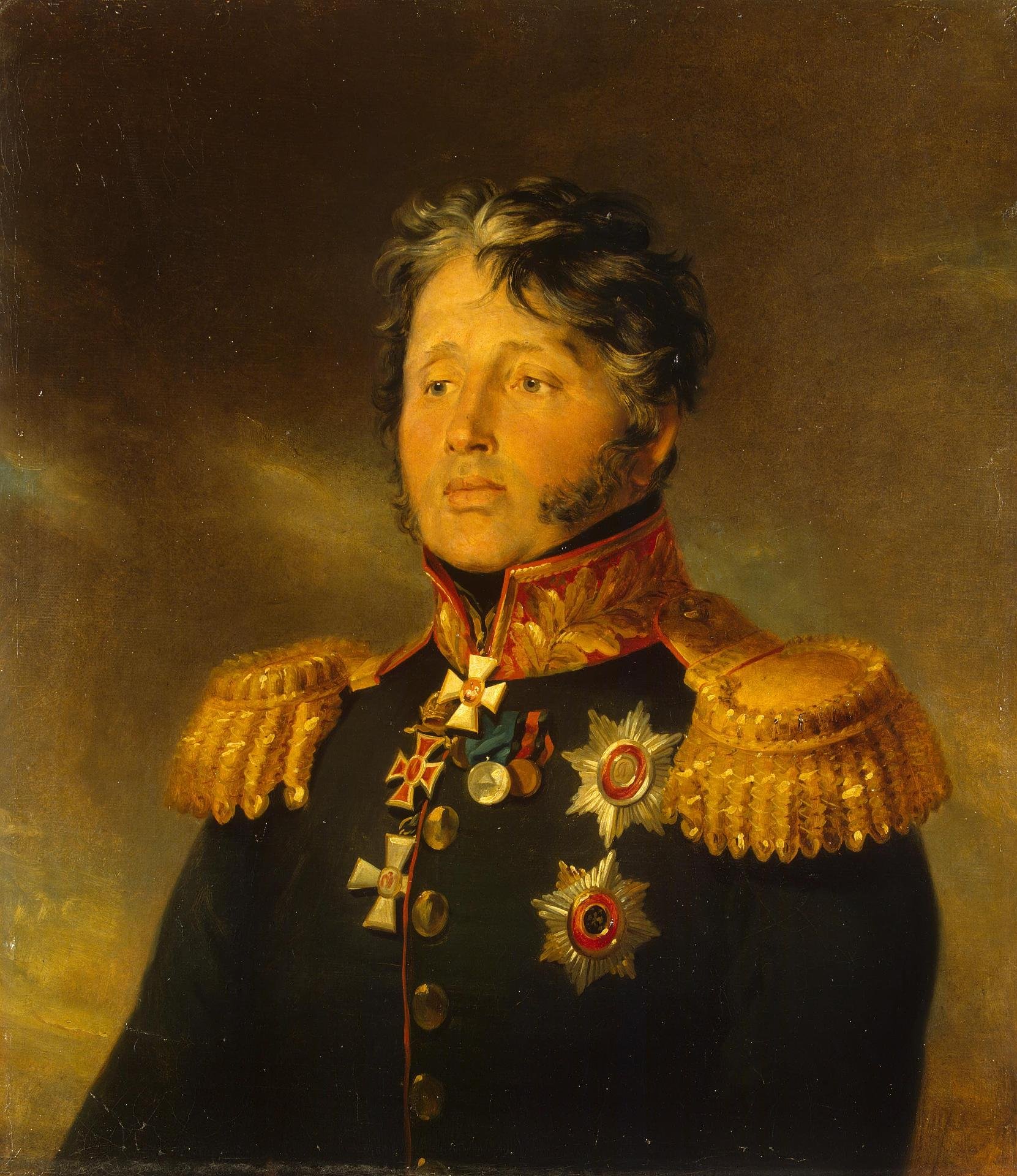 Ivan Vasiljevich Sabaneev (1770 – 25.08.1829) russian general